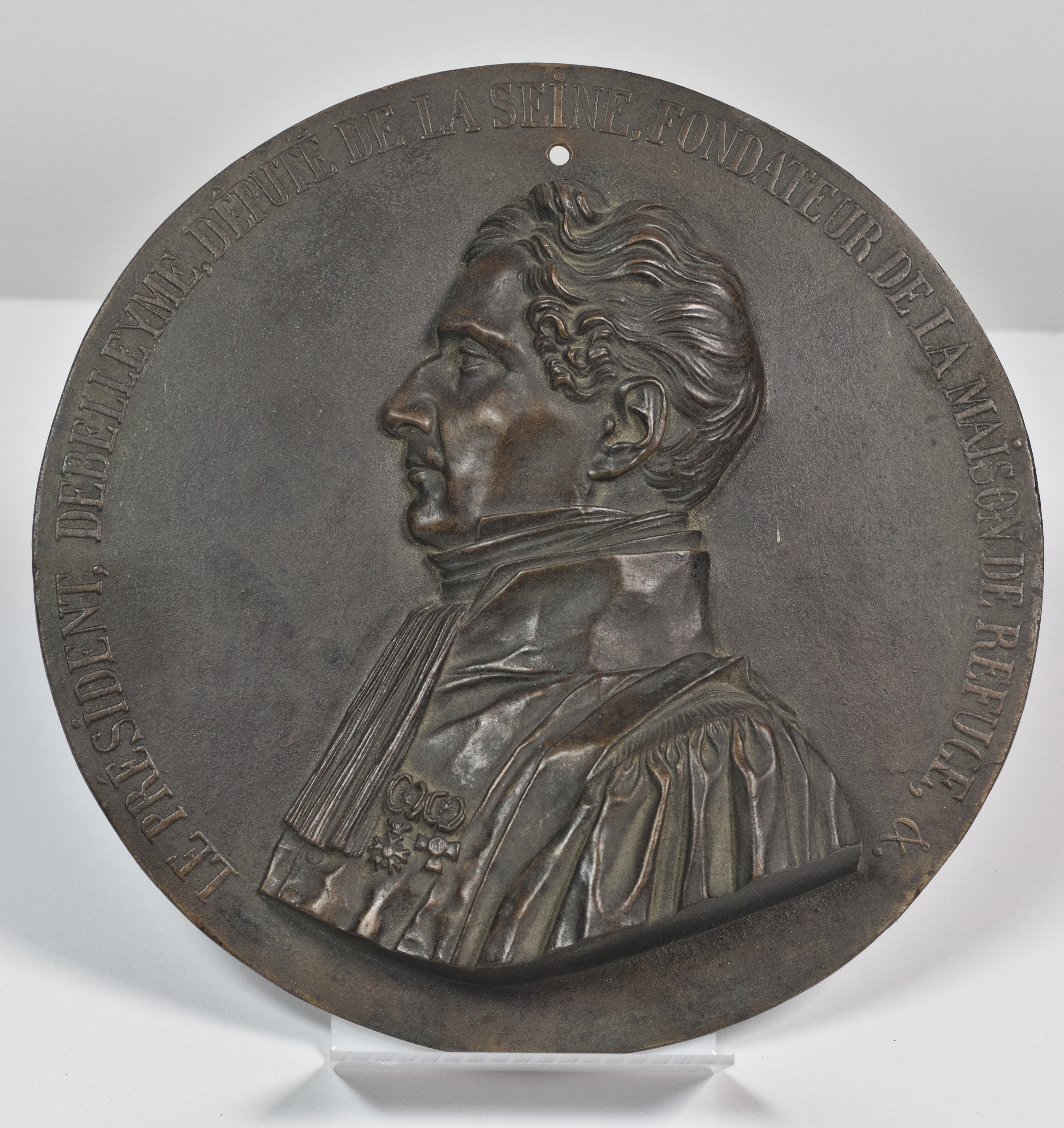 Médaille Debelleyme avec l'inscription LE PRÉSIDENT DEBELLEYME, DÉPUTÉ DE LA SEINE, FONDATEUR DE LA MAISON DE REFUGE, &. Fond Léon Losseau, Maison Léon Losseau, Mons.